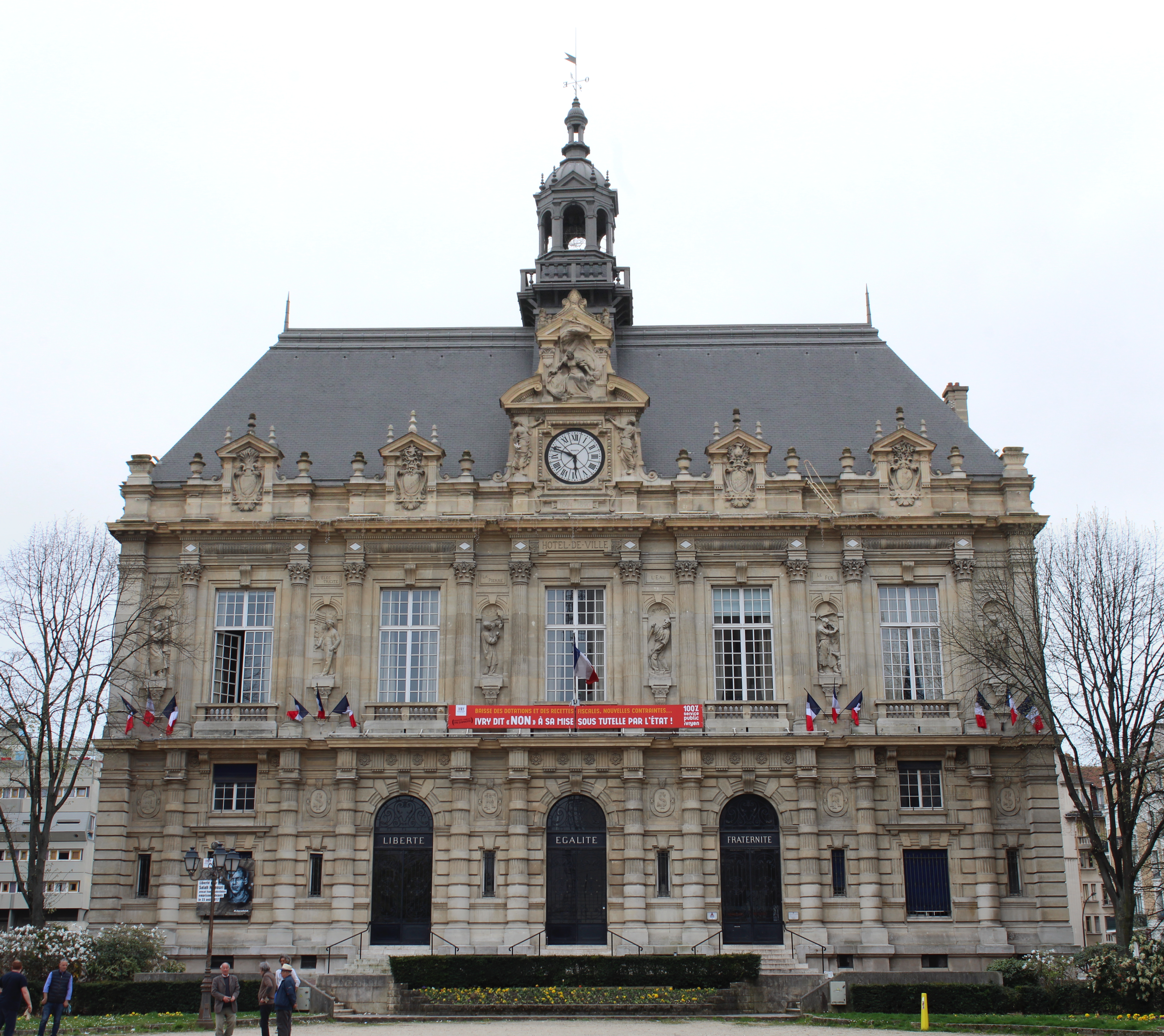 Hôtel de ville d'Ivry-sur-Seine.